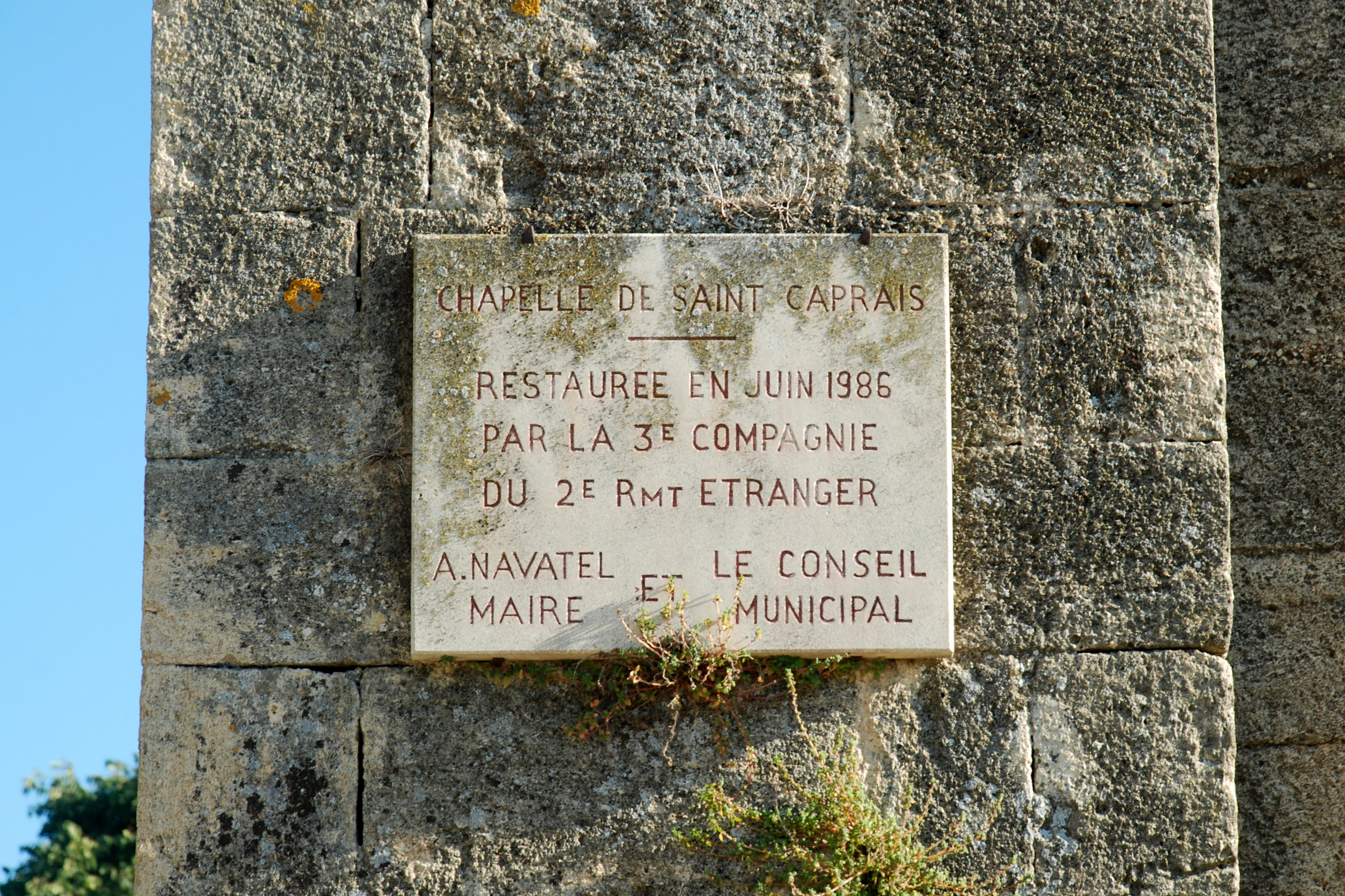 France - Gard - Chapelle Saint-Caprais de Castillon-du-Gard